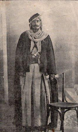 השייח' סלמאן אל הוזייל בצעירותו